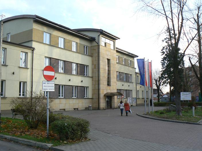 Mińsk Mazowiecki - starostwo powiatowe. Autor zdjęcia: Piotr Czaja.